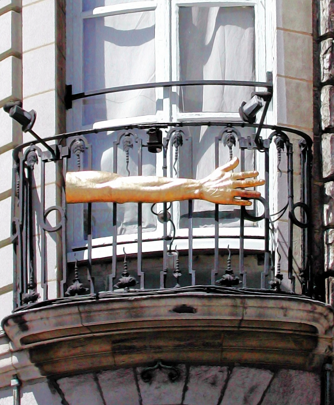 Enseigne en fer forgé du Bras d'Or, Rue de la Grande-Chaussée à Lille Nord (département français) .